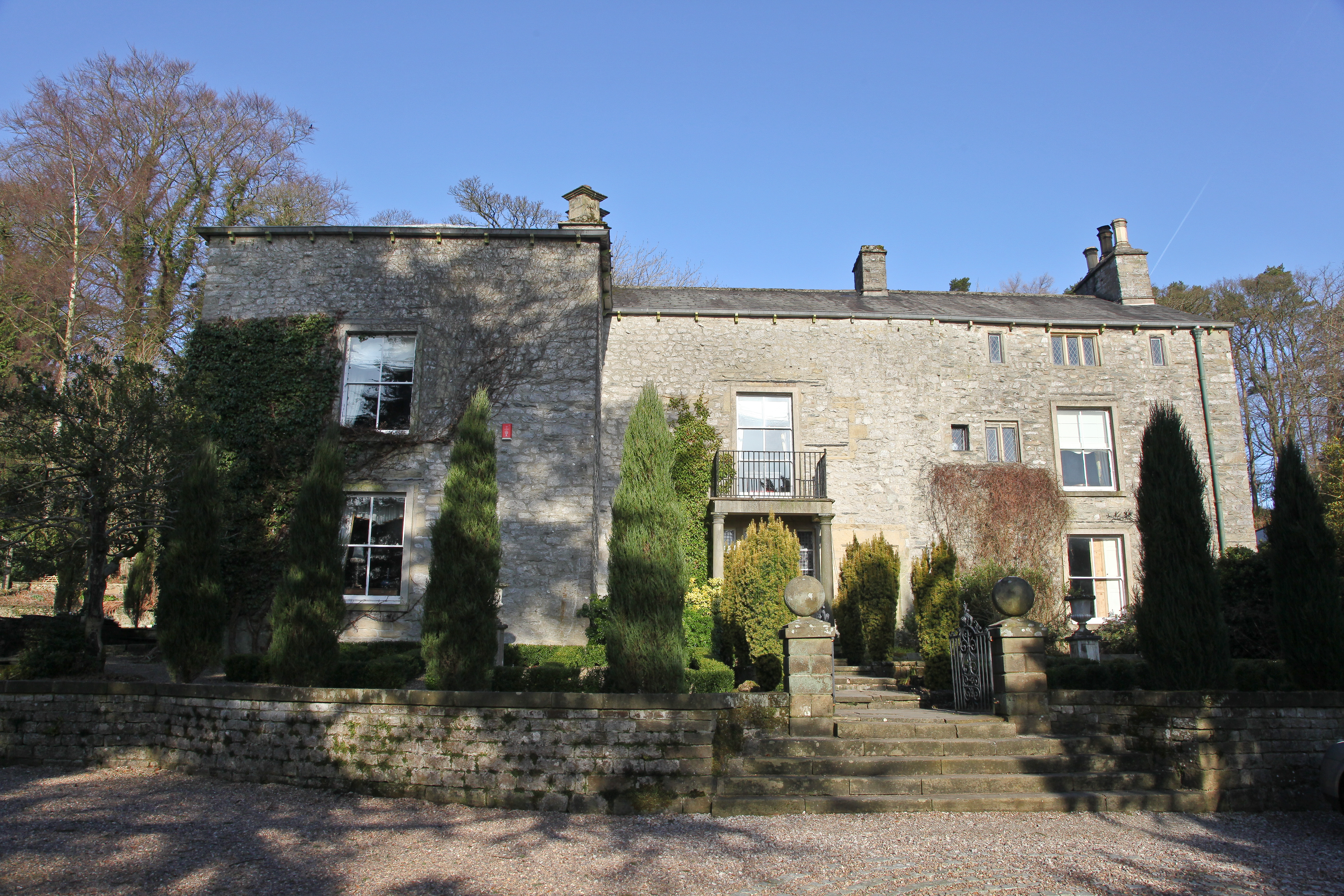 Austwick Hall.